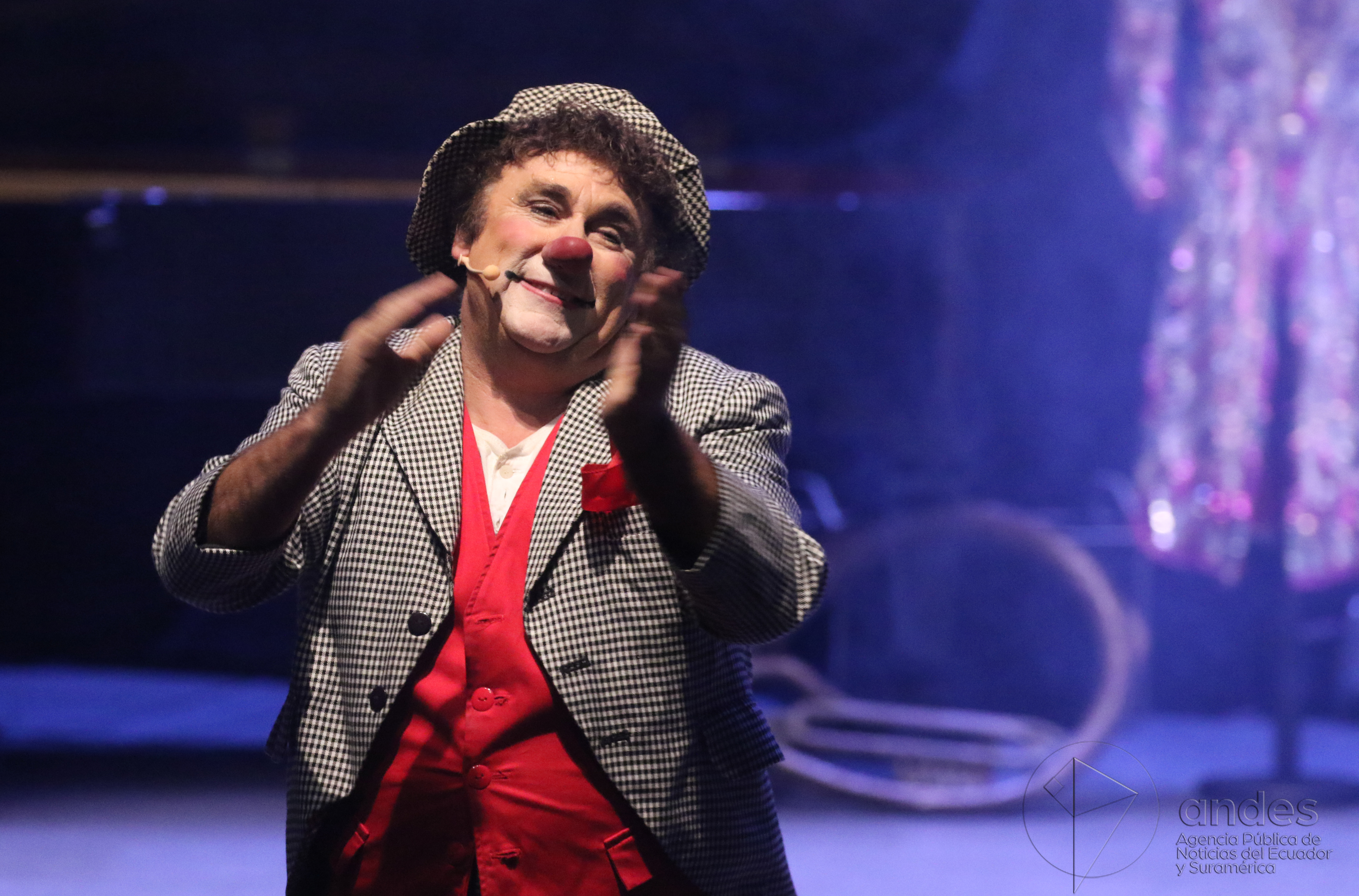 Quito, 10 de junio del 2017 (Andes).- Es uno de los tres payasos que han recibido el “Clown de Oro” del Festival de Montecarlo en toda la historia es por ello catalogado como el mejor payaso del mundo, a pesar de ello, David Larible es un artista sencillo, entregado por completo a su profesión y al público, es un clown que nunca deja de aprender. David Larible presentó por primera vez en el Ecuador su espectáculo “The clown of clowns” en la Casa de la Cultura Ecuatoriana de Quito. Una hora y media de risas y diversión en un show que diseñado para el disfrute de todos. ANDES/Micaela Ayala V.